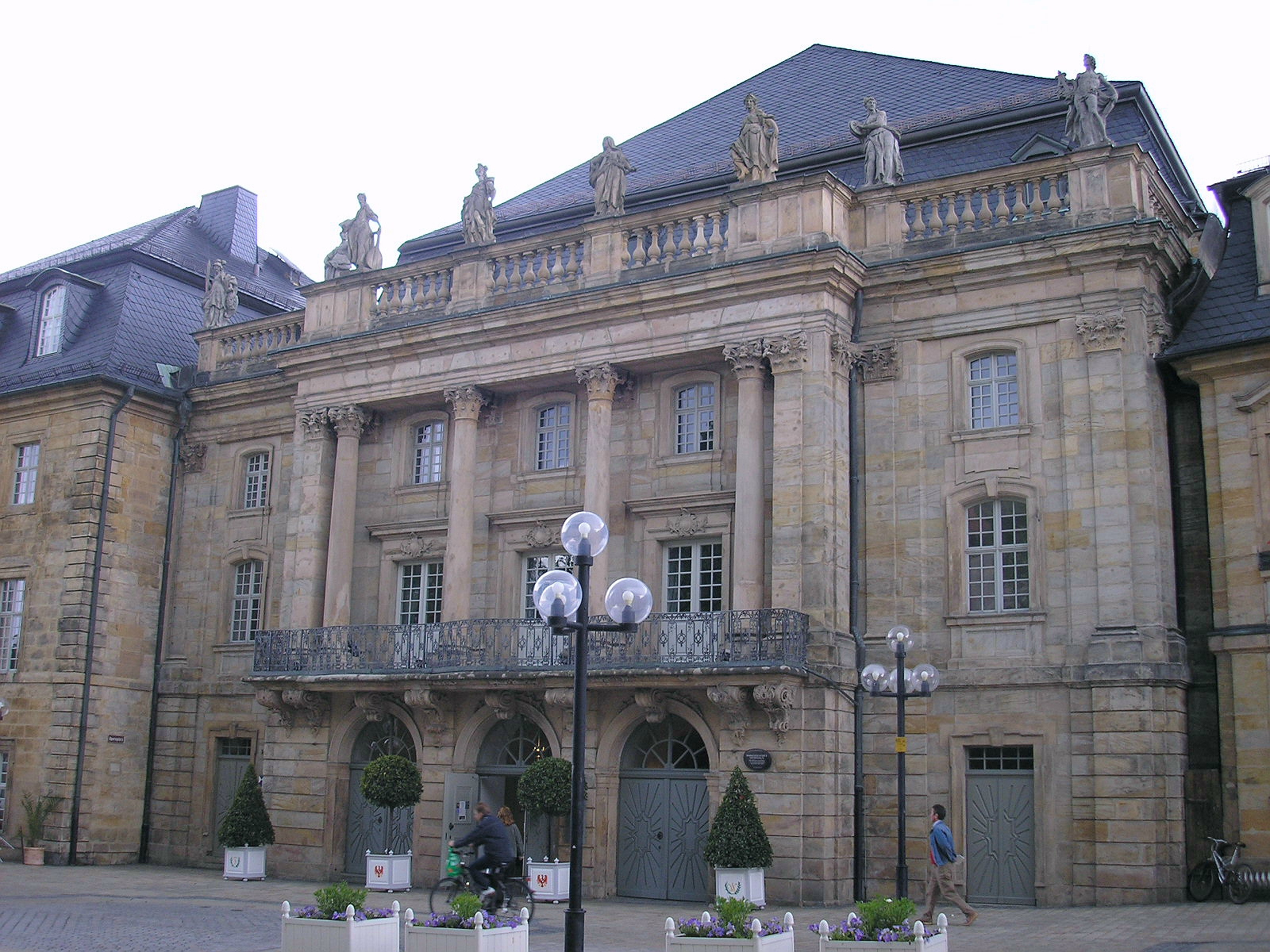 Portal des Opernhauses von Bayreuth